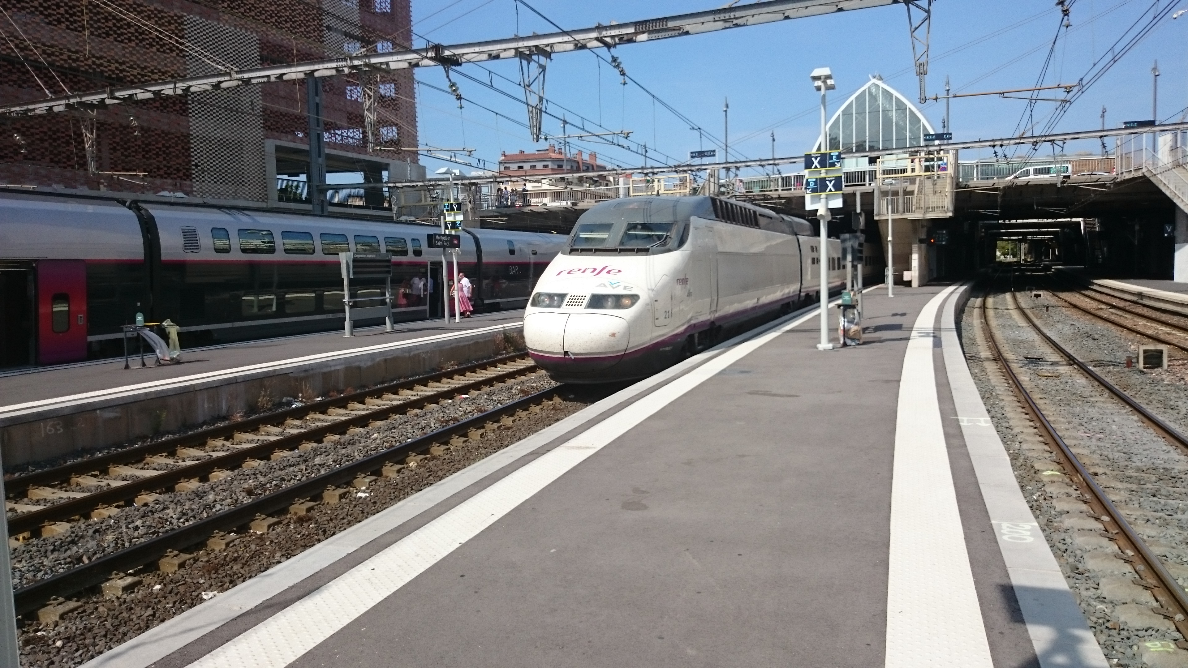 AVE richting Spanje in Montpellier